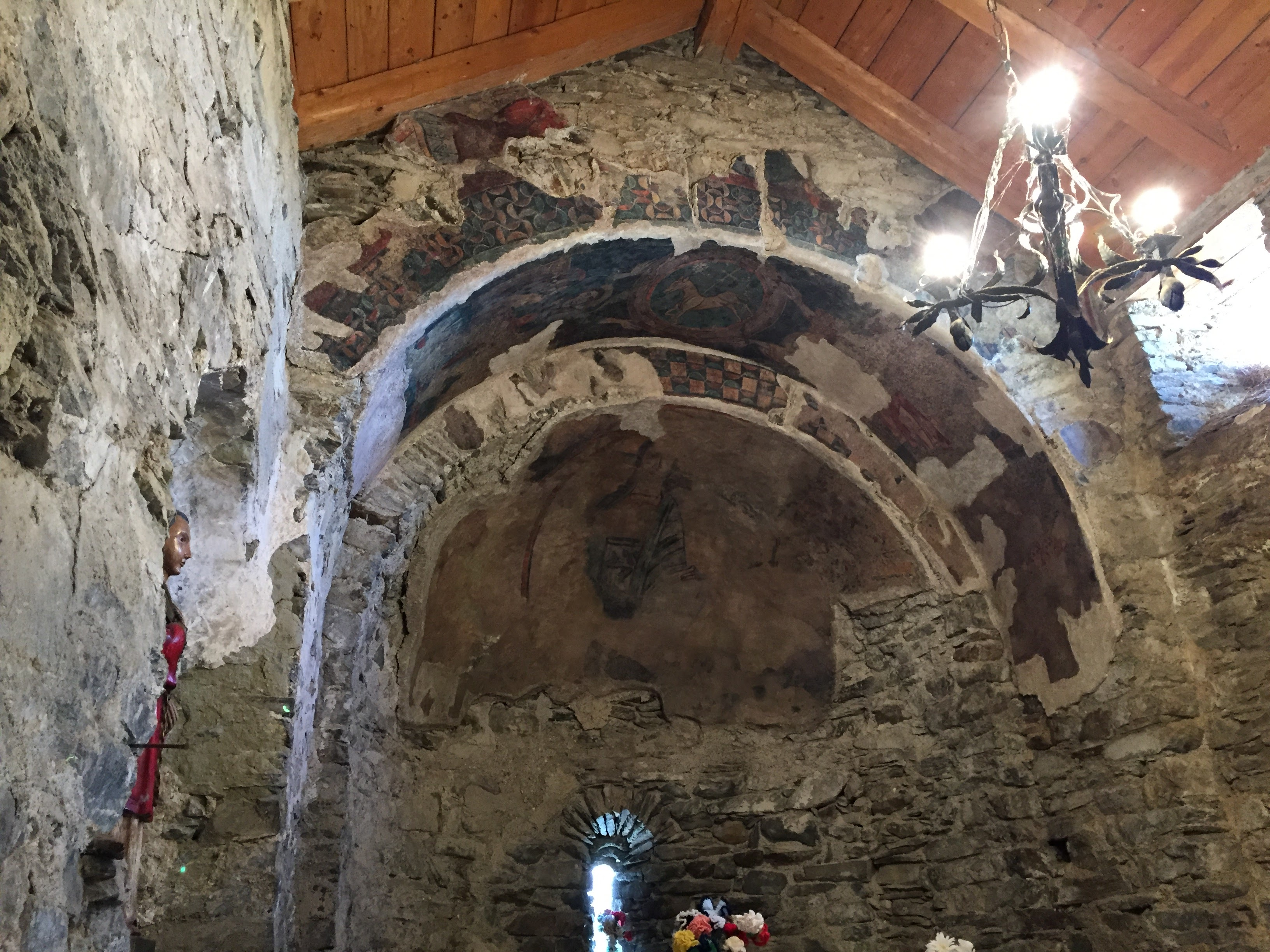 Església de Sant Romà d'Aineto (Lladorre)